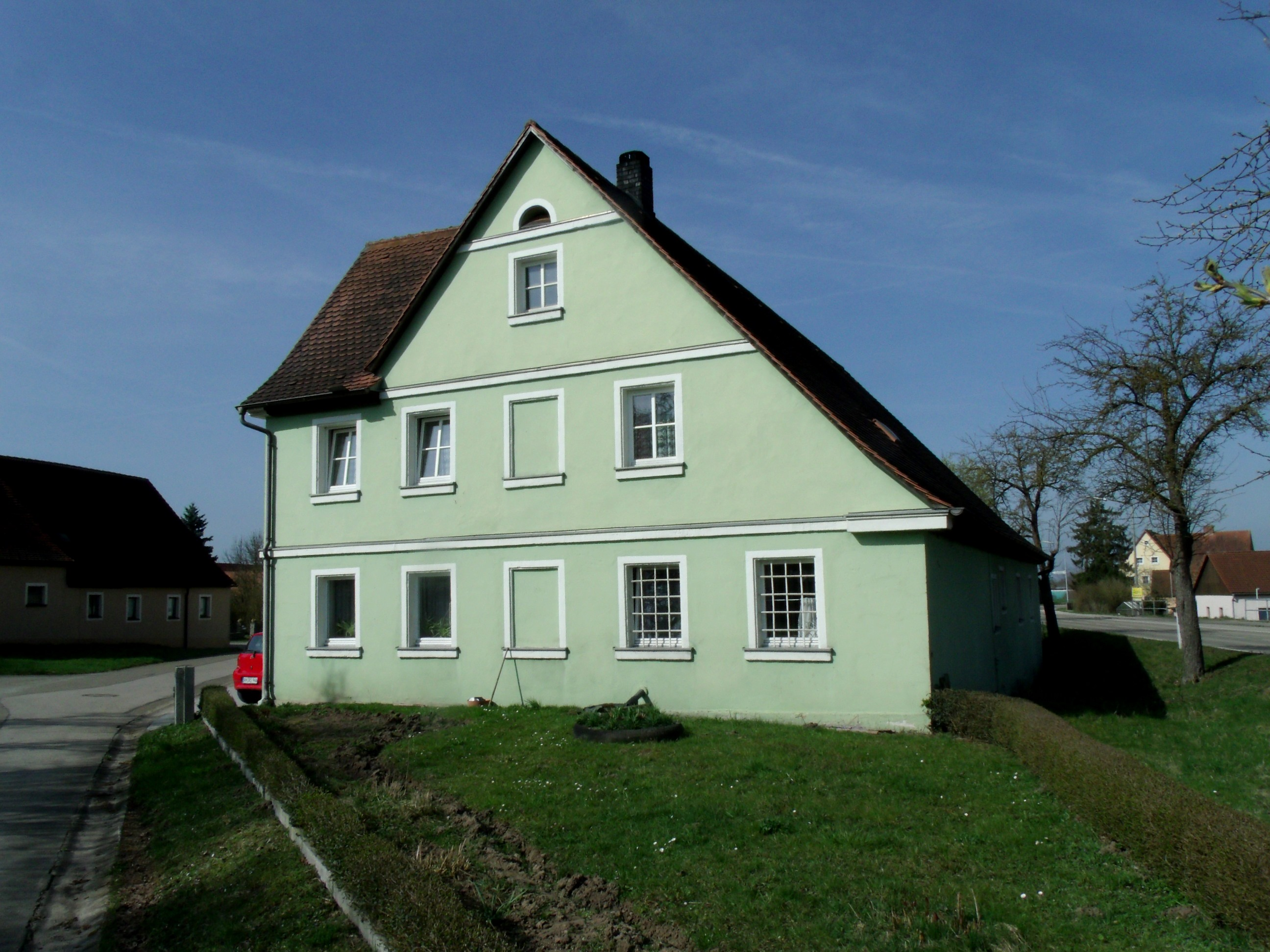 Hannenbach, Ortsteil von Leutershausen im Landkreis Ansbach, eingeschossiges Haus mit Steildach, Zwerchgiebel und Putzgliederung